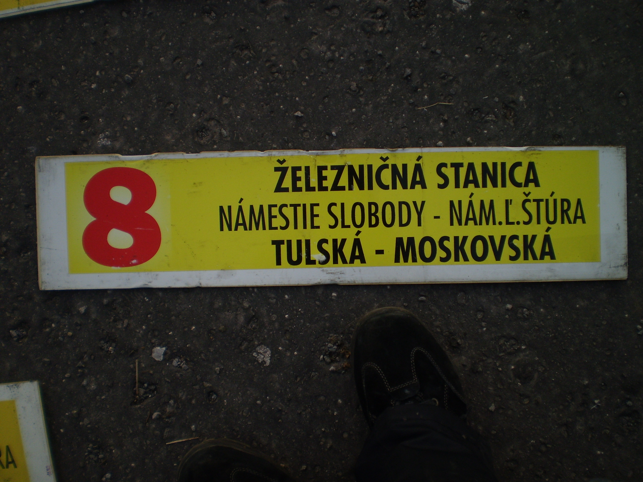 line 8